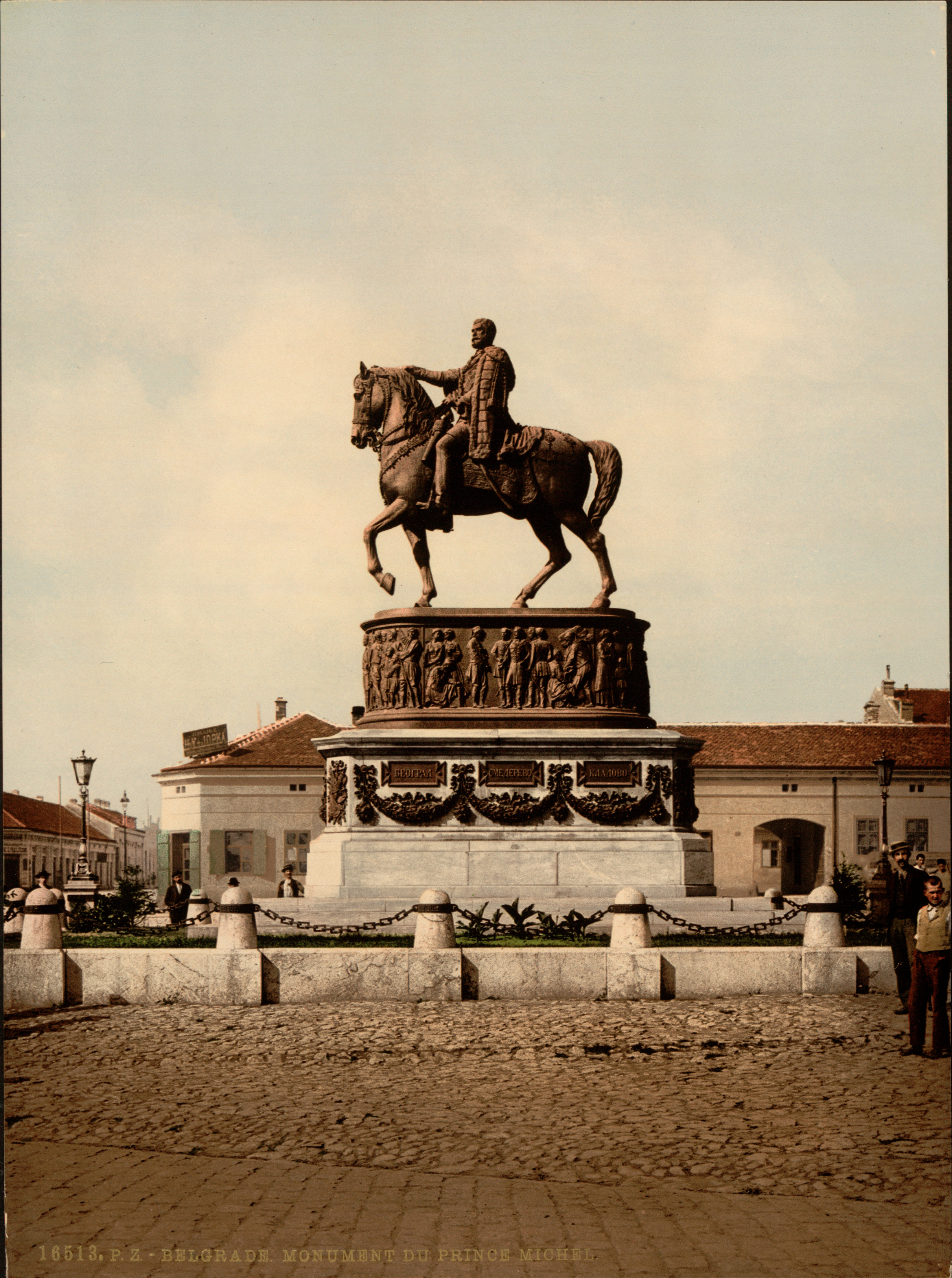 Prince Michael's Monument, Belgrade, Serbia - 1890